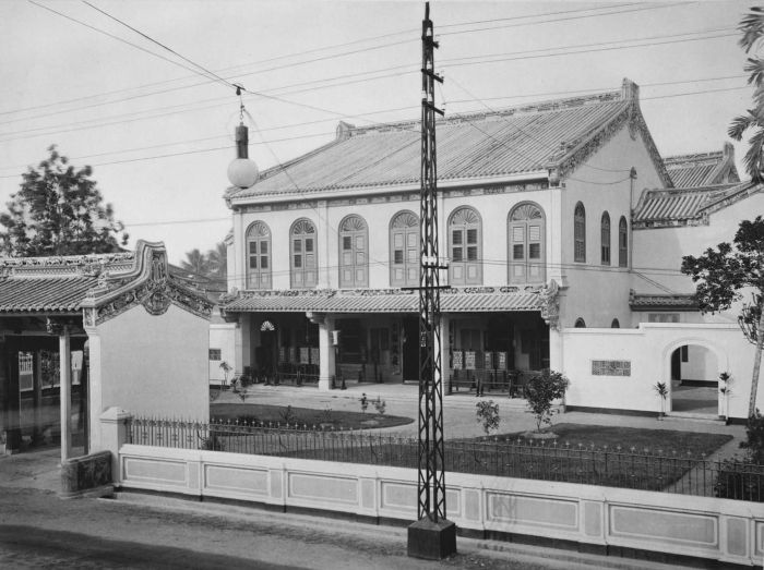 Foto. Het woonhuis van een Chinese kapitein in Medan